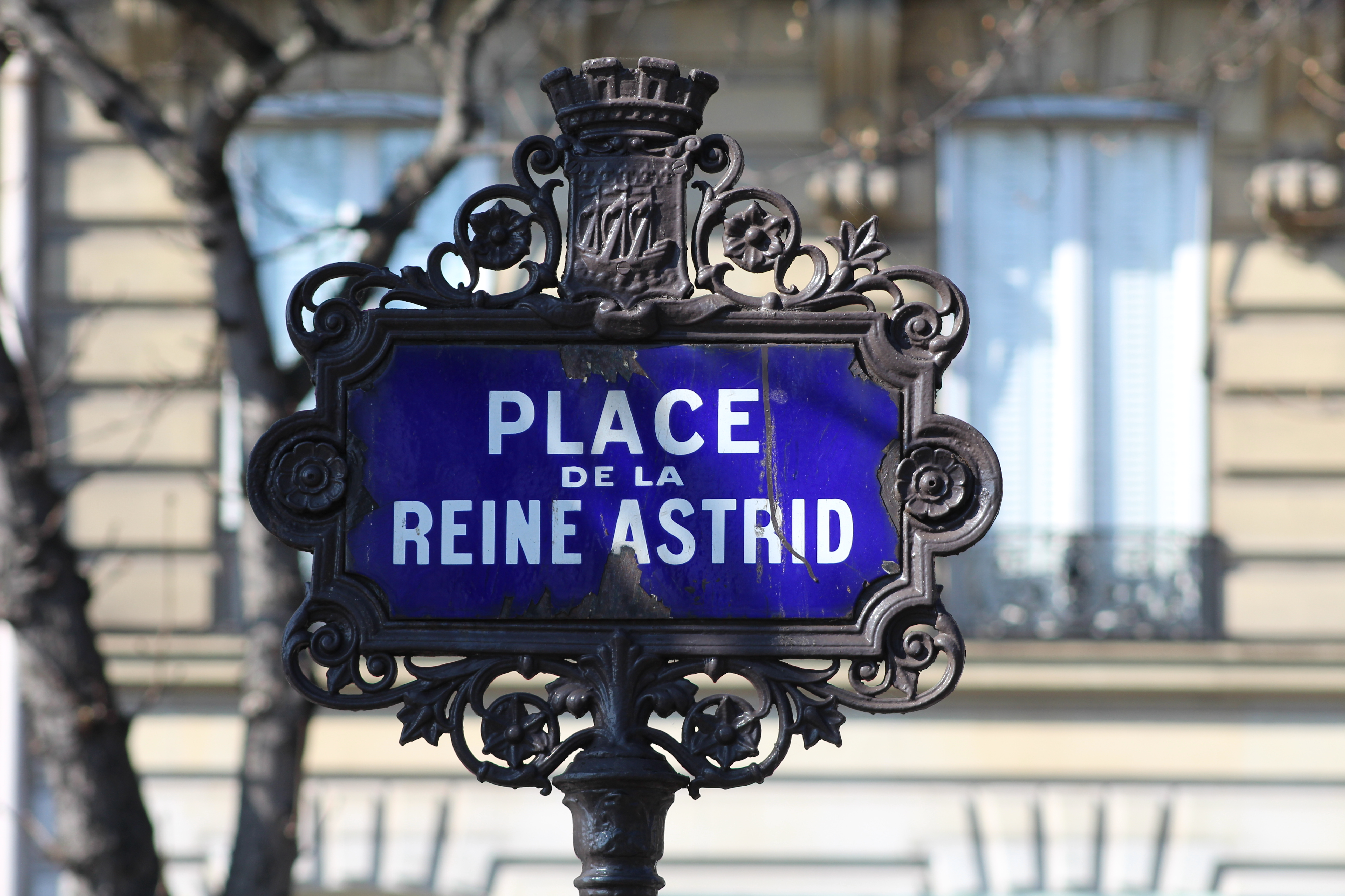 Plaque de la place de la Reine-Astrid, Paris.